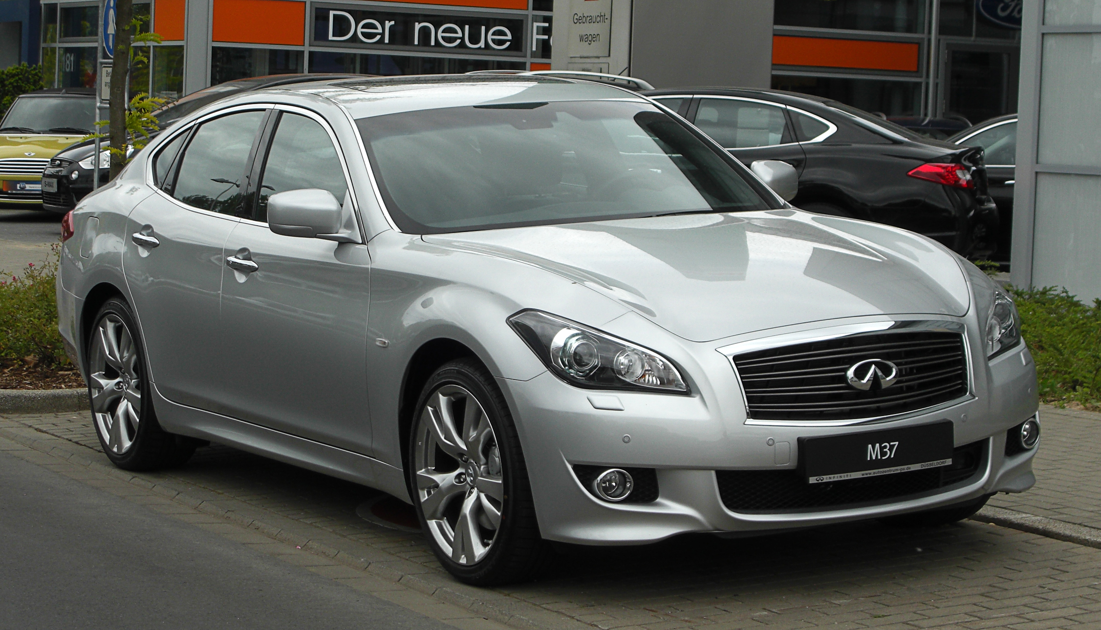 Infiniti M37 S (Y51)